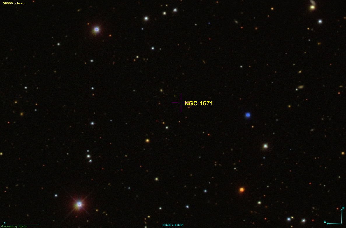 Image créée à l'aide du logiciel Aladin Sky Atlas du Centre de Données astronomiques de Strasbourg et des données de SDSS (Sloan Digital Sky Survey).